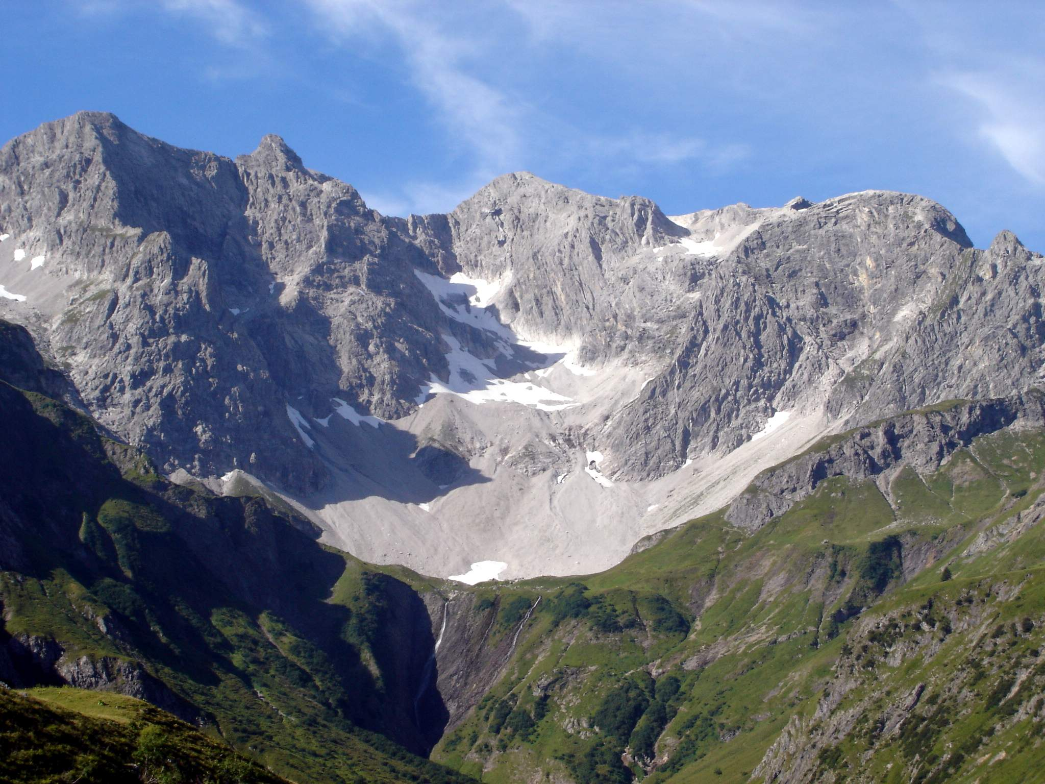 links Butzenspitze rechts die Braunarlspitze von Schröcken gesehen.